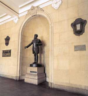 Estátua em bronze de José Bonifácio de Andrada e Silva, o Moço (1827-1886). Sobrinho do Patriarca da Independência, foi poeta, orador e político. Formou-se em Direito no Largo de São Francisco em 1853, tornando-se professor da casa, anos mais tarde. A estátua está na entrada do prédio principal, Largo de São Francisco, 95.